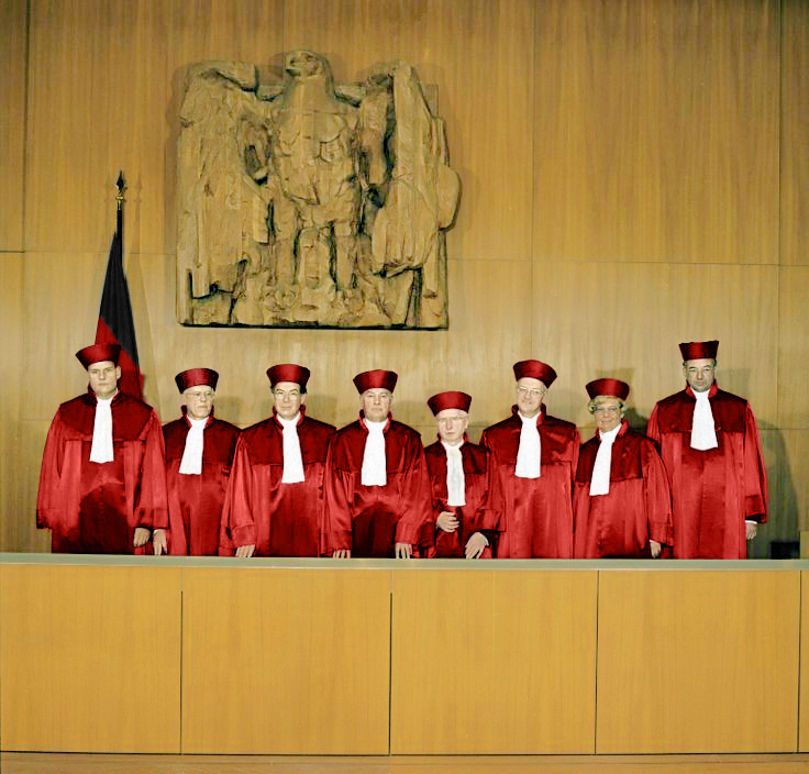 18.12.1989 Bundesverfassungsgericht Karlsruhe II. Senat in alter Zusammensetzung (bis 1.12.1989) v.li. Dr. Everhardt Franßen, Konrad Kruis, Prof. Dr.Dr. Ernst Wolfgang Böckenförde, Vizepräsident Dr. Ernst Gottfried Mahrenholz, Ernst Träger, Prof. Dr. Hans Hugo Klein, Dr. Karin Graßhof, Dr. Paul Kirchhof